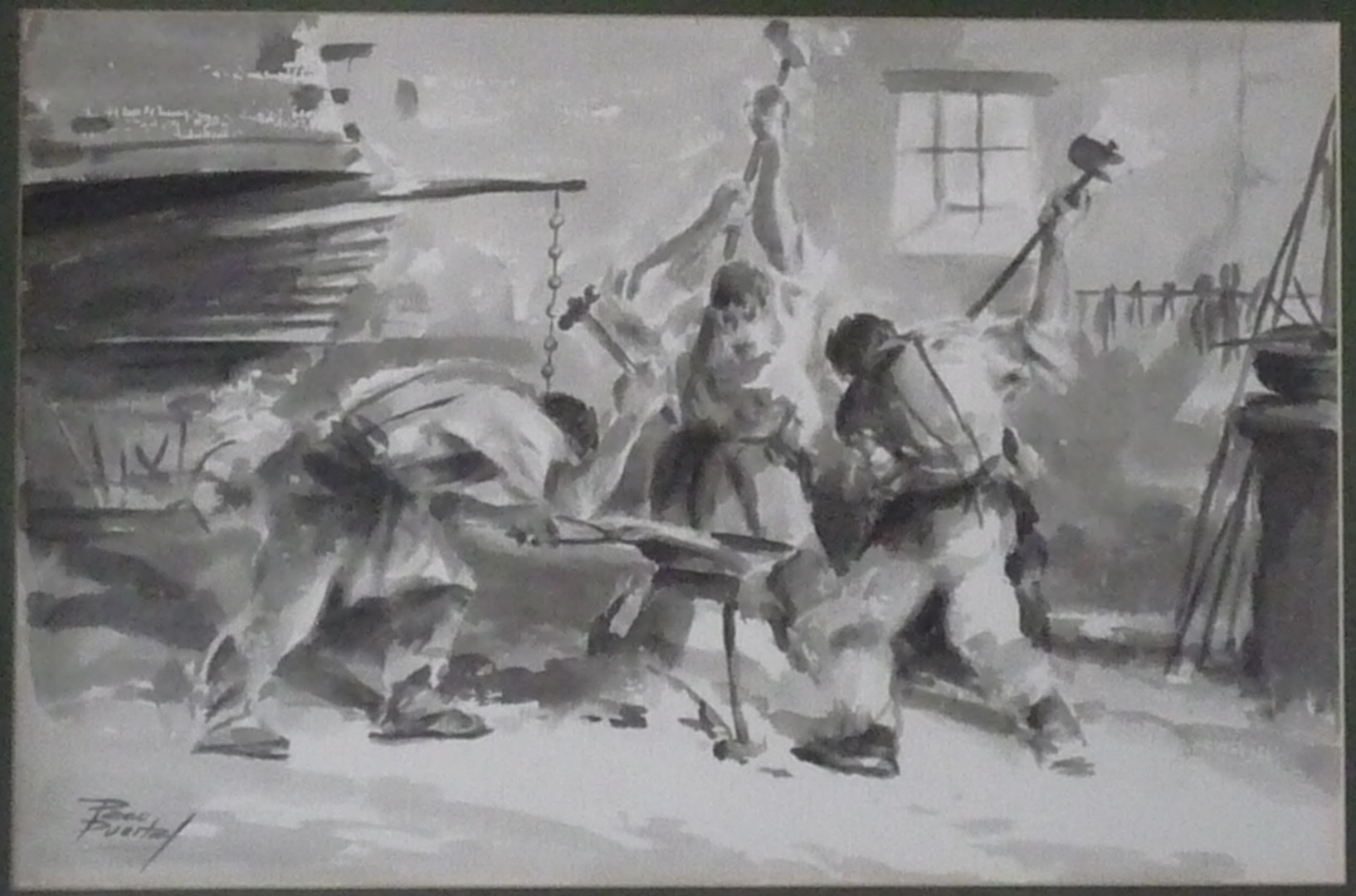 Paco Puertas, "La fragua", aguada